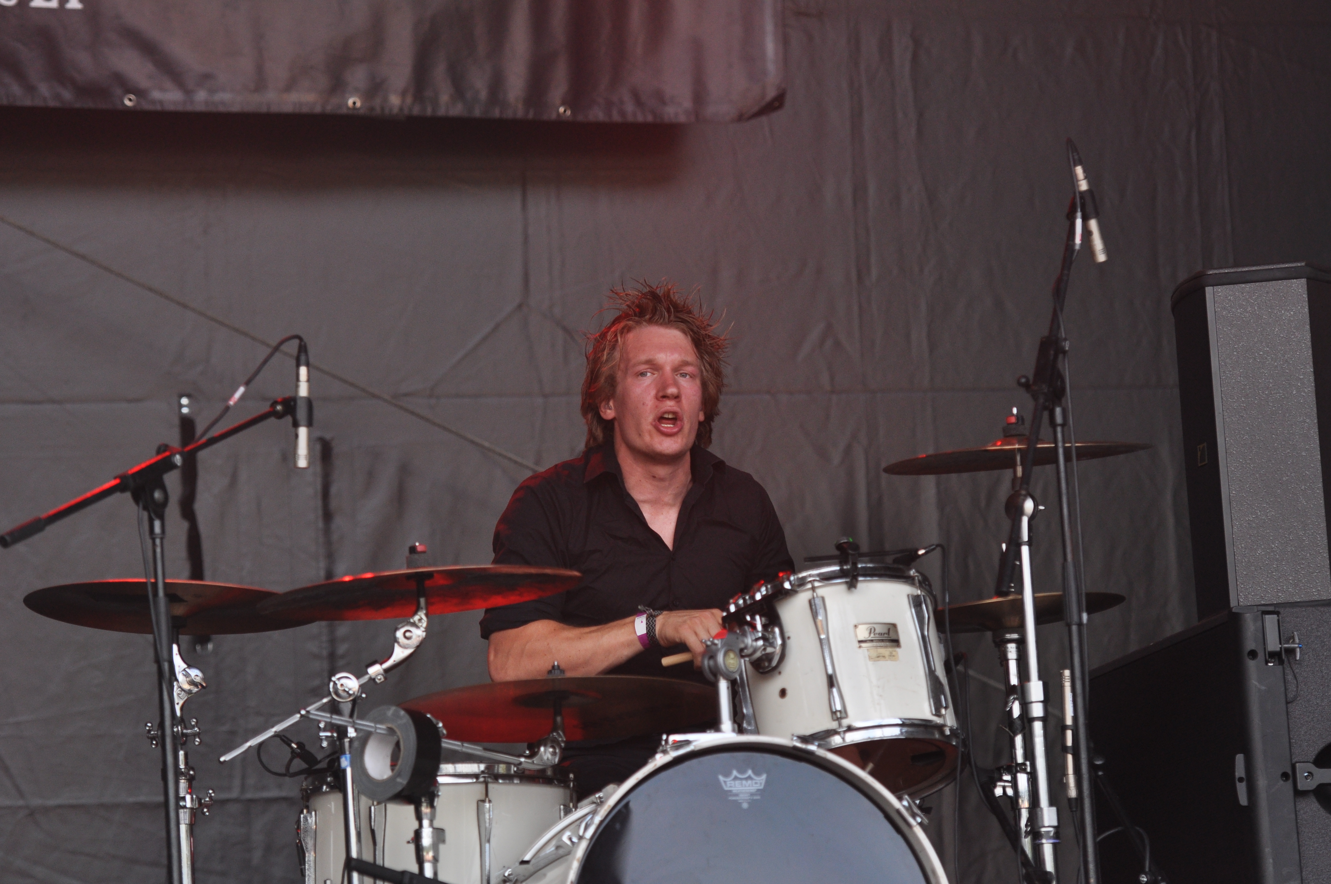 Rantanplan bei Rocken am Brocken 2014